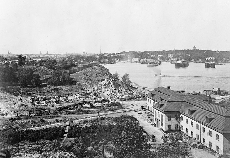 Arbeten för Hammarbyledens framdragning vid Danviken. Vy från Danviksklippan mot Danviks hospital och Fåfängan. I fonden Djurgården